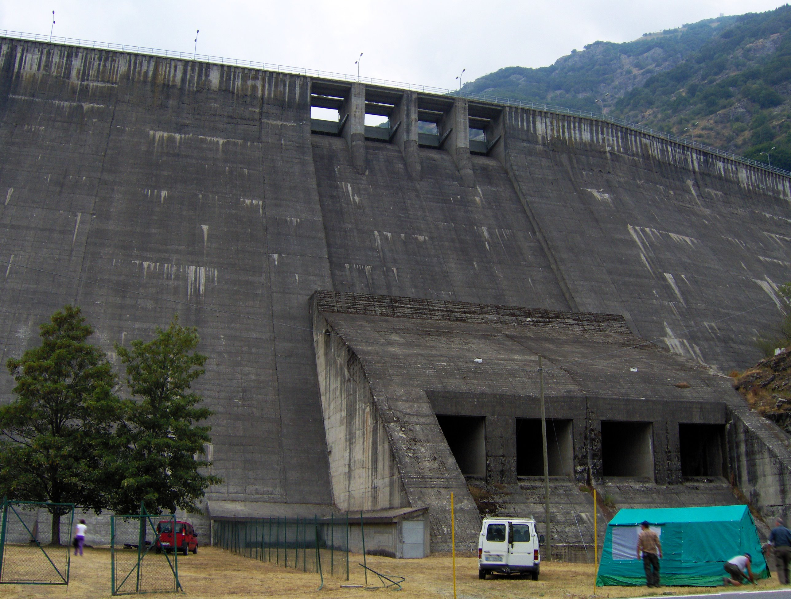 Entracque, Diga della Piastra vista dal lato del paese